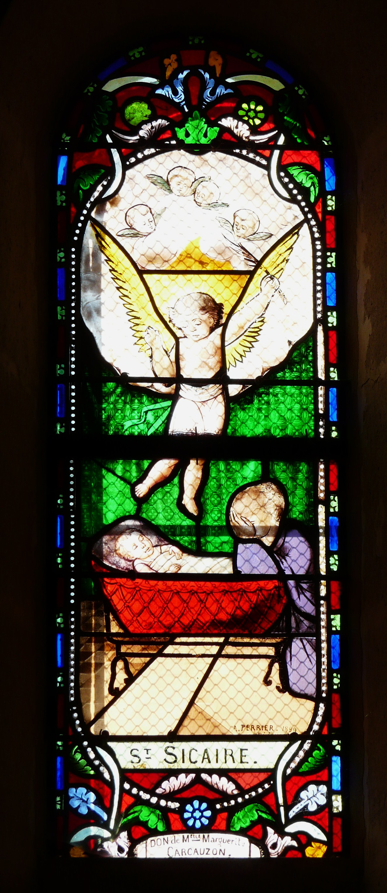 Vitrail représentant saint Sicaire, église Sainte-Madeleine, Montagrier, Dordogne, France